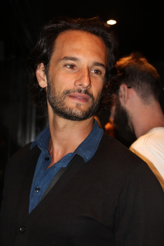 Rodrigo Santoro-012